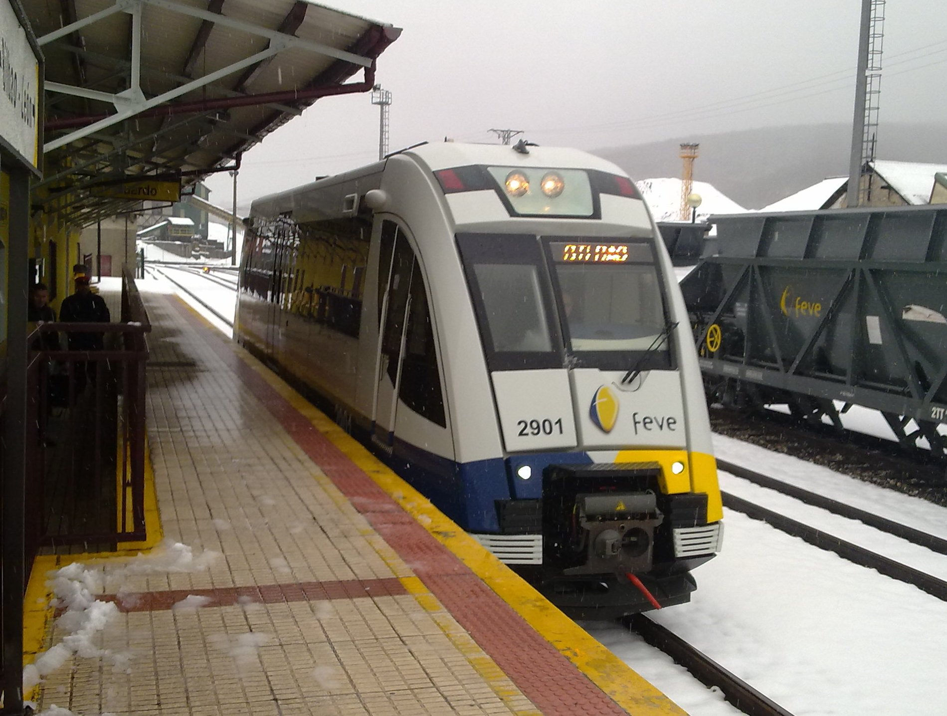 Automotor 2901 de la serie 2900 de FEVE en la estación de Guardo (Palencia) en España.